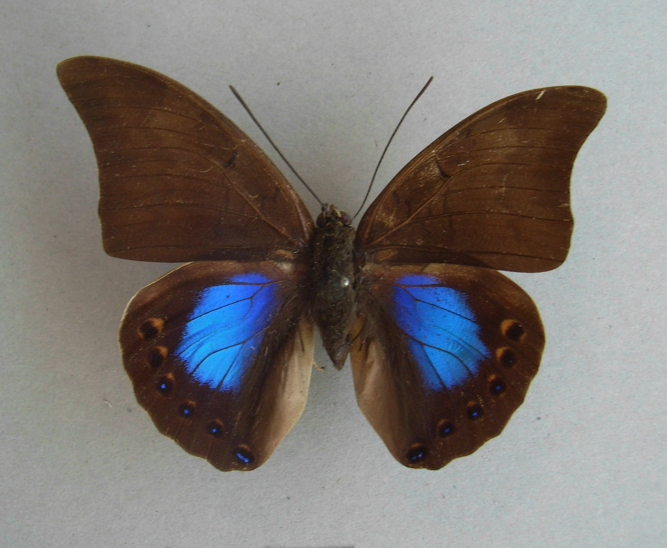 Noreppa chromus (Guérin-Ménéville,1844) or Prepona (Noreppa) chromus.